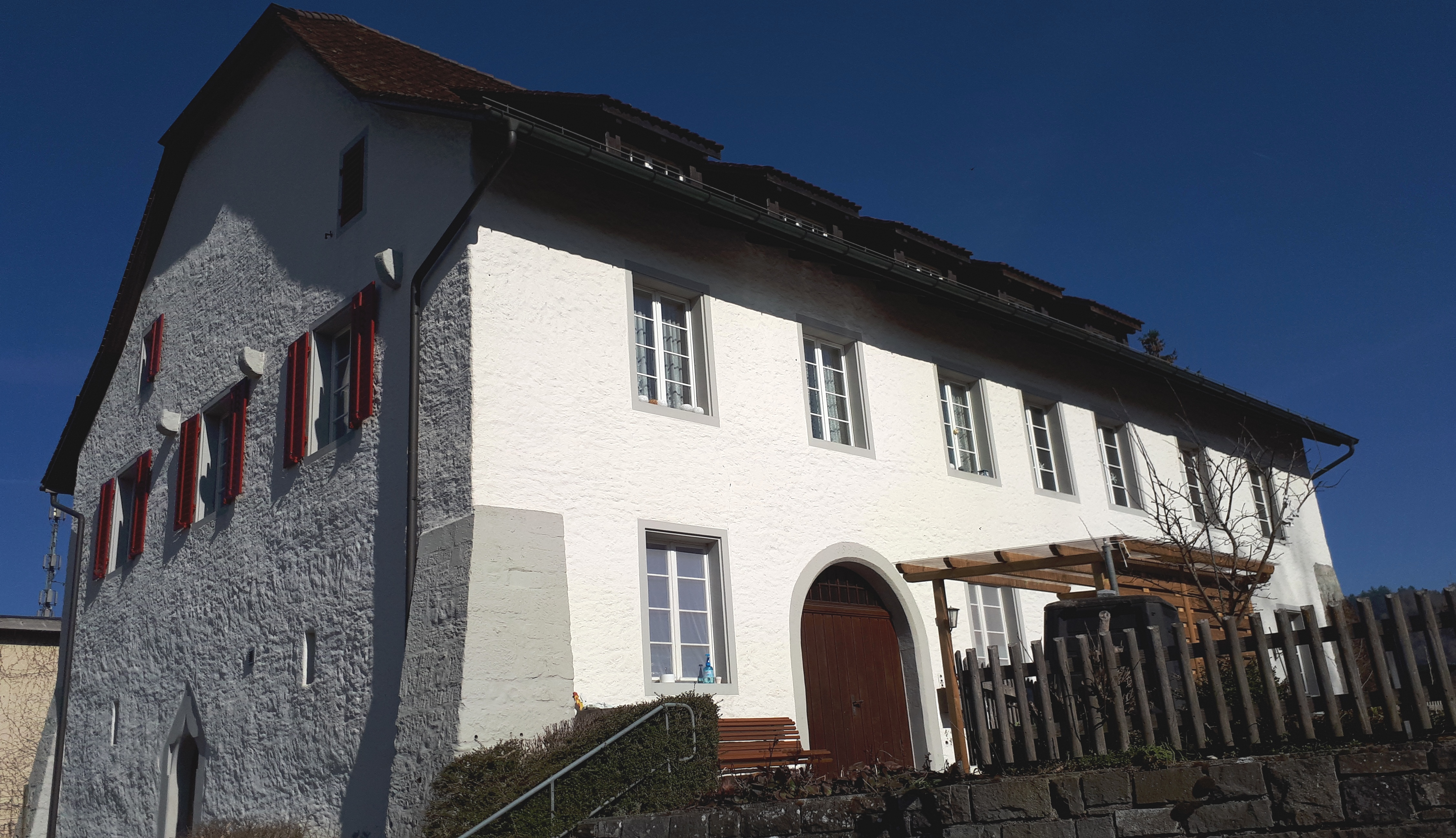 Ehemaliges Zehntenhaus